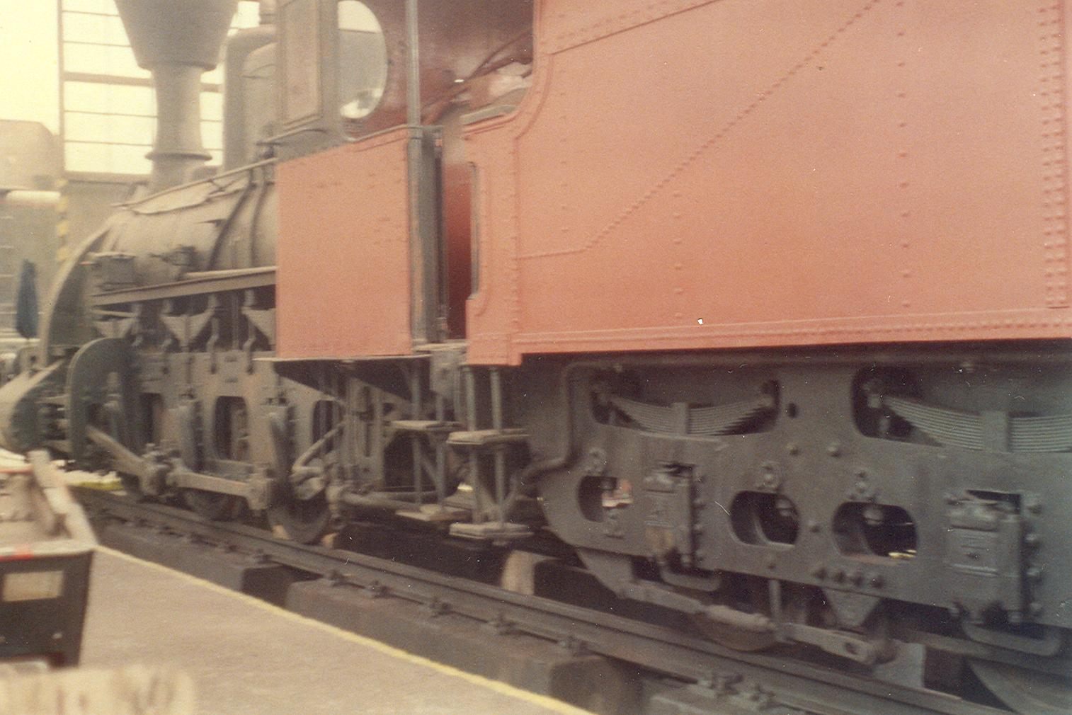 324.391 in der Werkstatt in Lužna